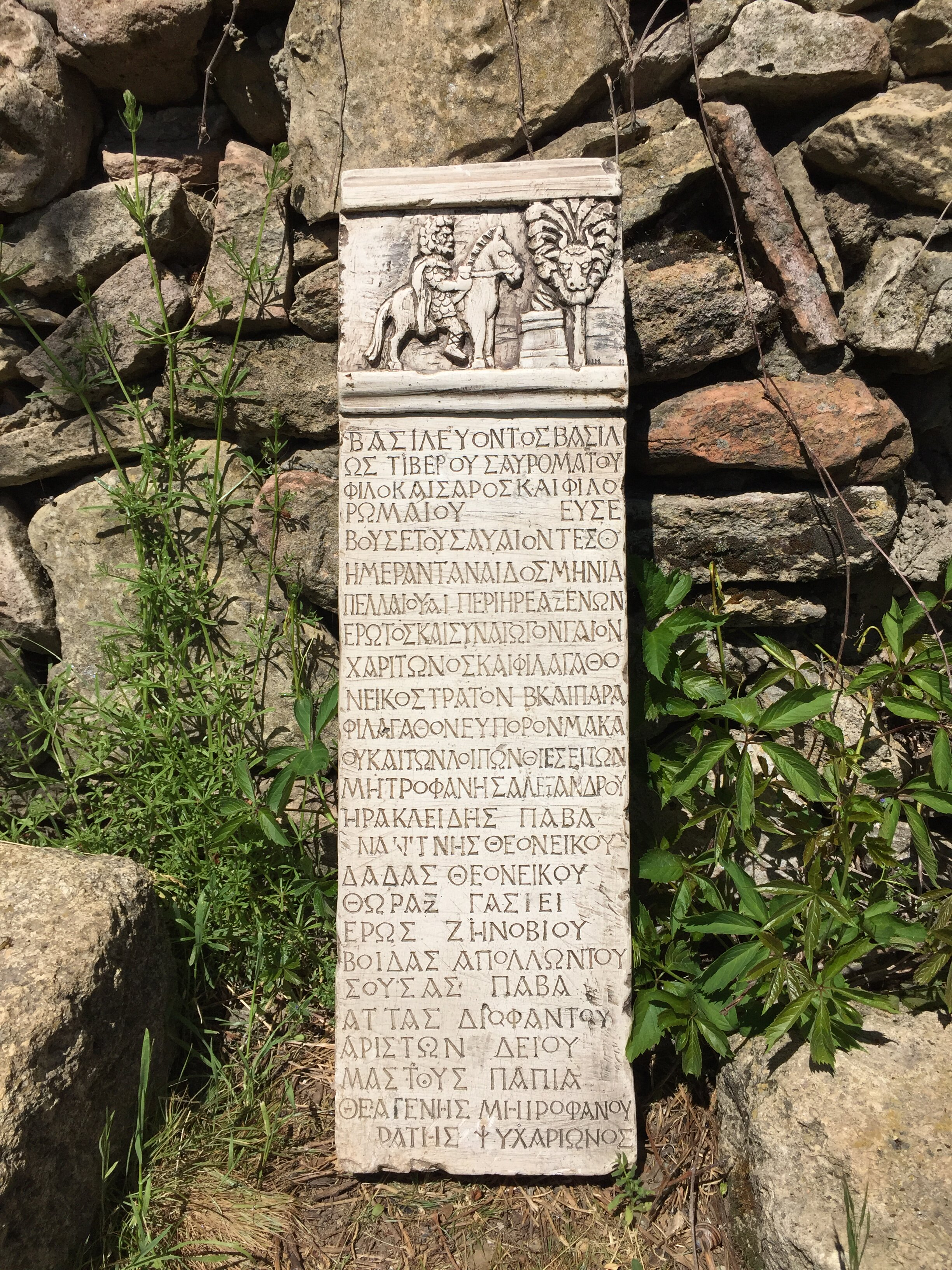 Танаис, археологический музей-заповедник: Недвиговка, Мясниковский район, Ростовская область This image is related to the protected area of Russia number 6100081